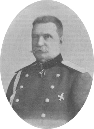 Александр Генрихович Сандецкий, русский генерал, командующий войсками Казанского военного округа.